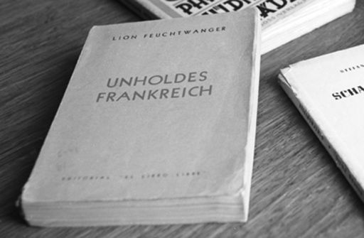 Die Erstausgabe von Unholdes Frankreich von Lion Feuchtwanger. Sie ist Bestandteil seiner Bibliothek der verbrannten Bücher, die seit 2009 in der Augsburger Universitätsbibliothek beheimatet ist.